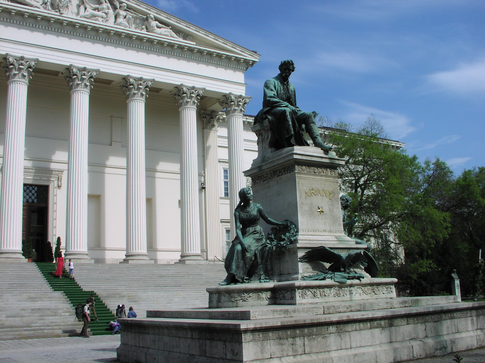 Arany János szobra a Nemzeti Múzeum előtt, Budapesten. A mellékalakok Toldi Miklós és szerelme Piroska. Stróbl Alajos alkotása.